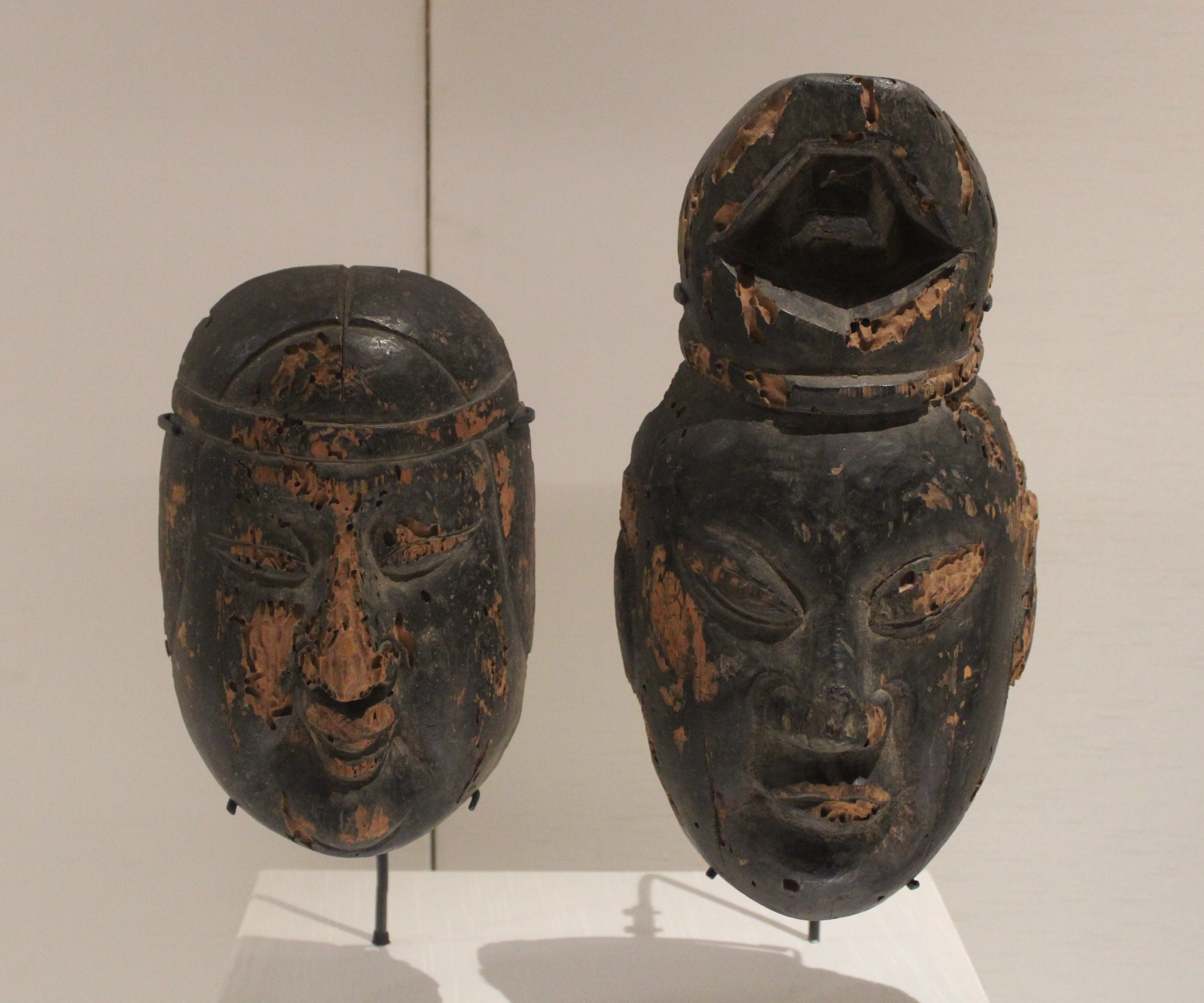 Ritual masks of a male and female kami. A pair of ritual masks for use in kagura performance, with a hand-grip carved into the back. A piece of paper with inscription and seal is attached to the back. 16th century. 1998,1219.20 and 1998,1219.21